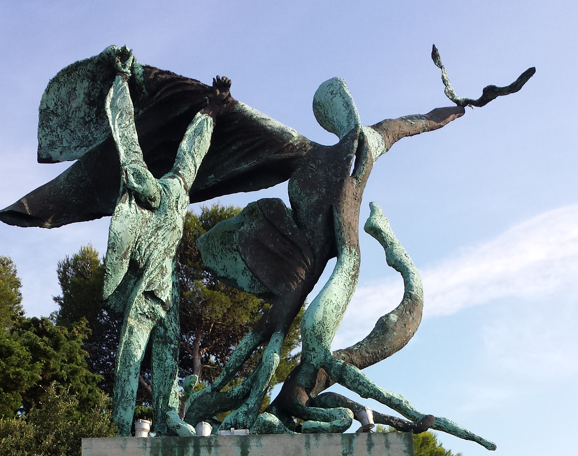 Monumento ala resistenza, opera di Pericle Fazzini situata nel parco del Pincio, in Ancona